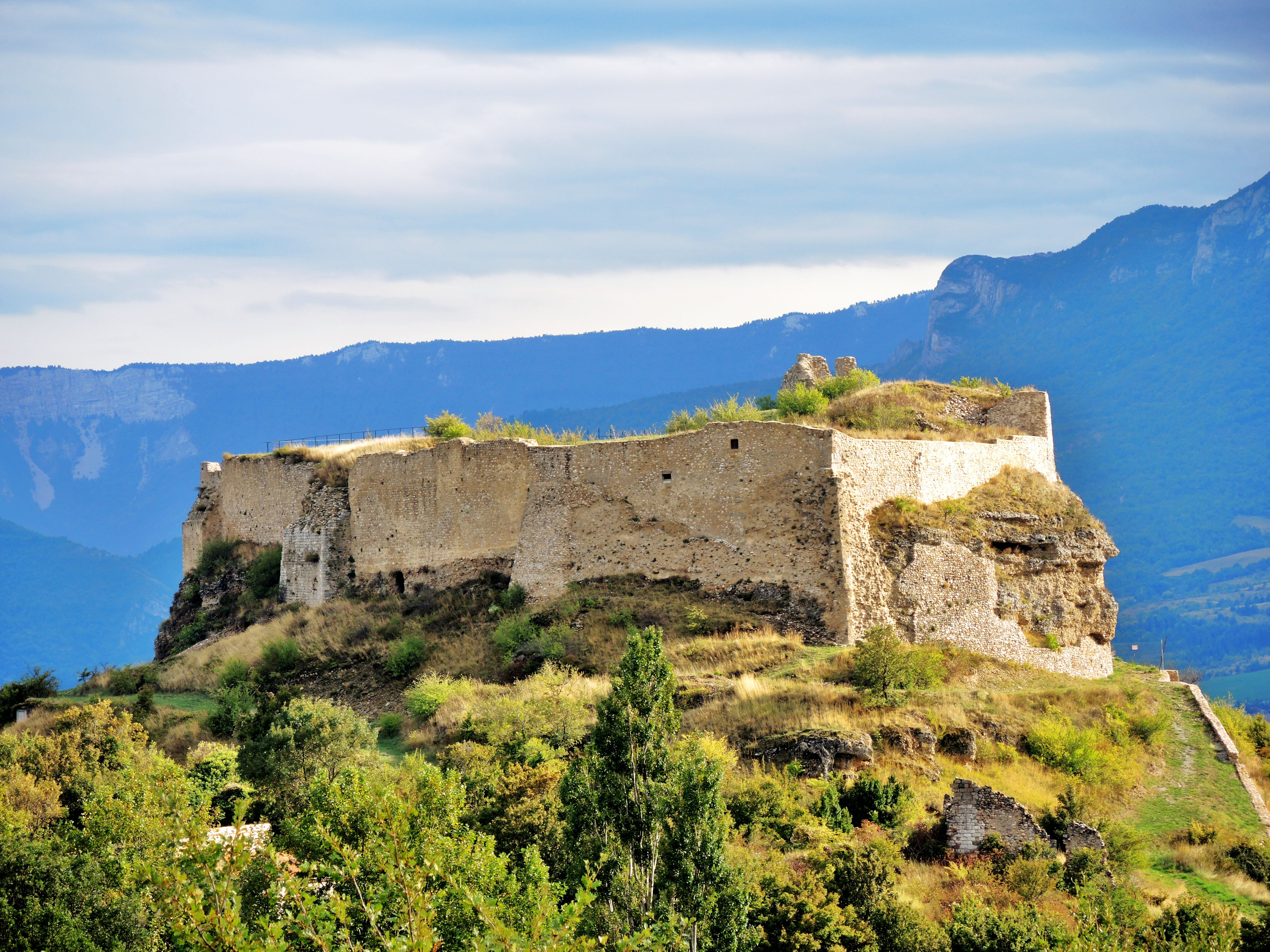 Ruines du château médiéval, vu de la montée des Romeyeres